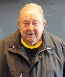 Lennart Johansson (right)